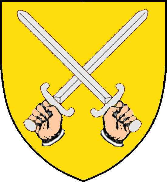 Vapensköld för svenska frälseätten Kijl